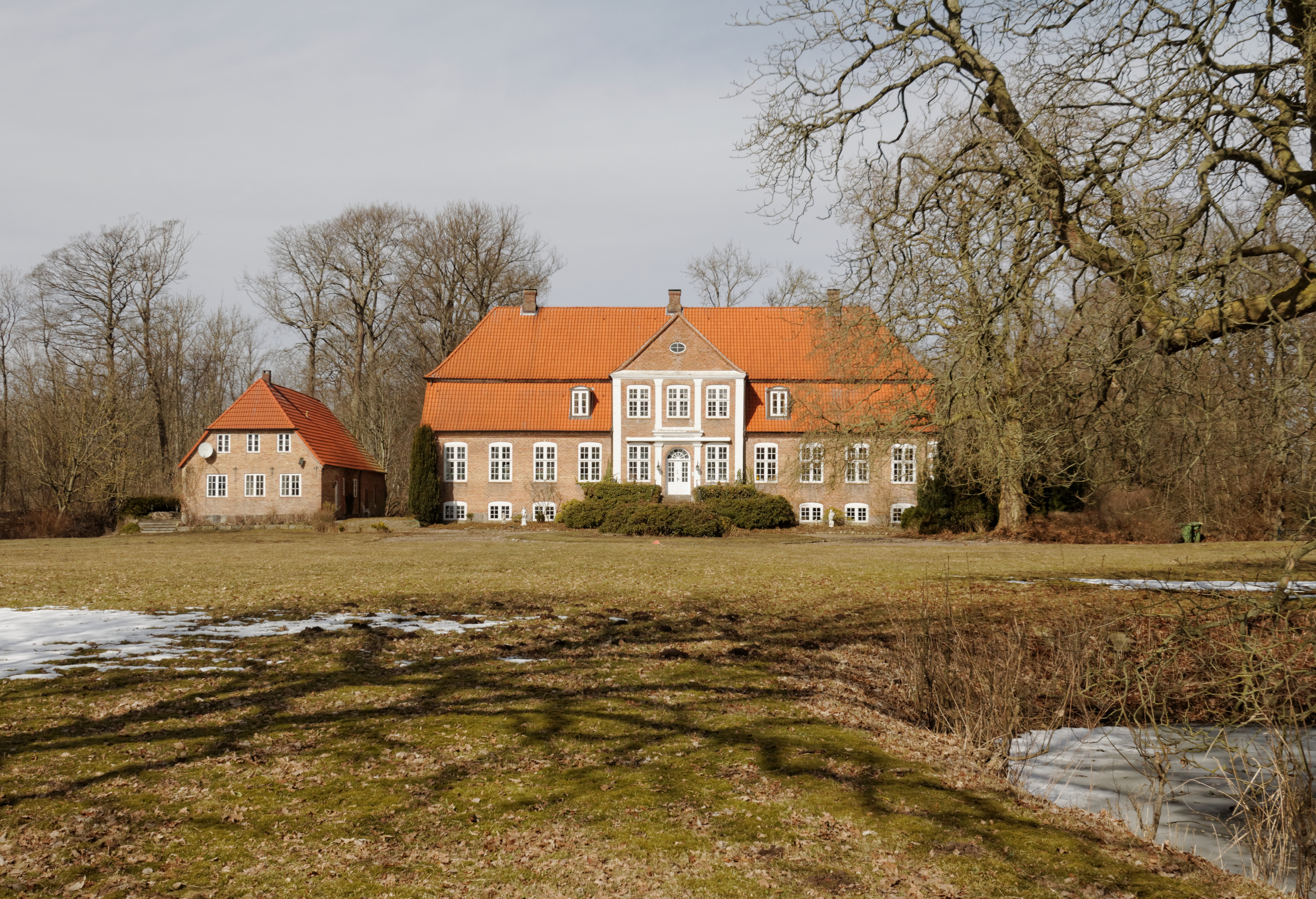 Oersberg, Gut Toestorf; Herrenhaus